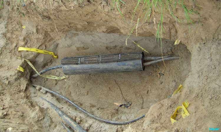 Thermoplast-Klemmmuffe bei Telefon-Hauptkabel der T-Com